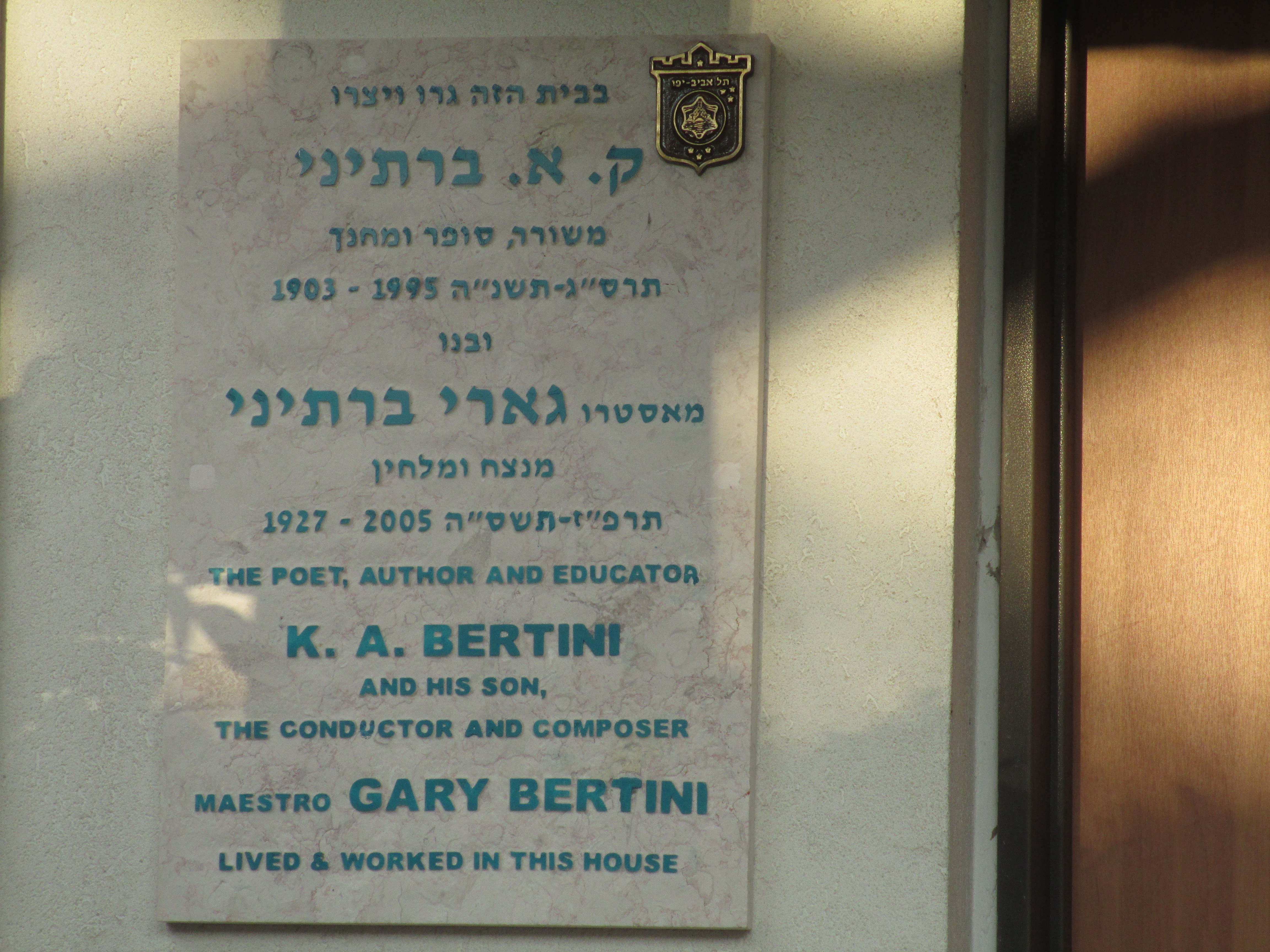 לוחית זיכרון על ביתם של ק.א. ברתיני וגארי ברתיני ברח' ועידת קטוביץ' 17 בתל אביב